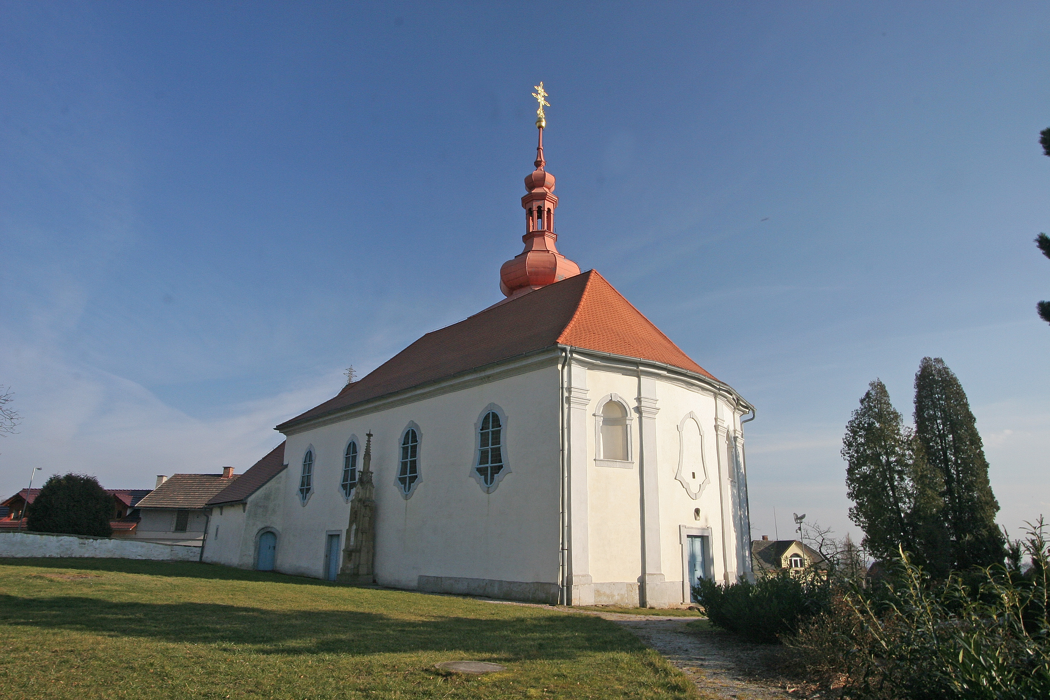 Kostel sv. Bartoloměje (Chodovice), Chodovice